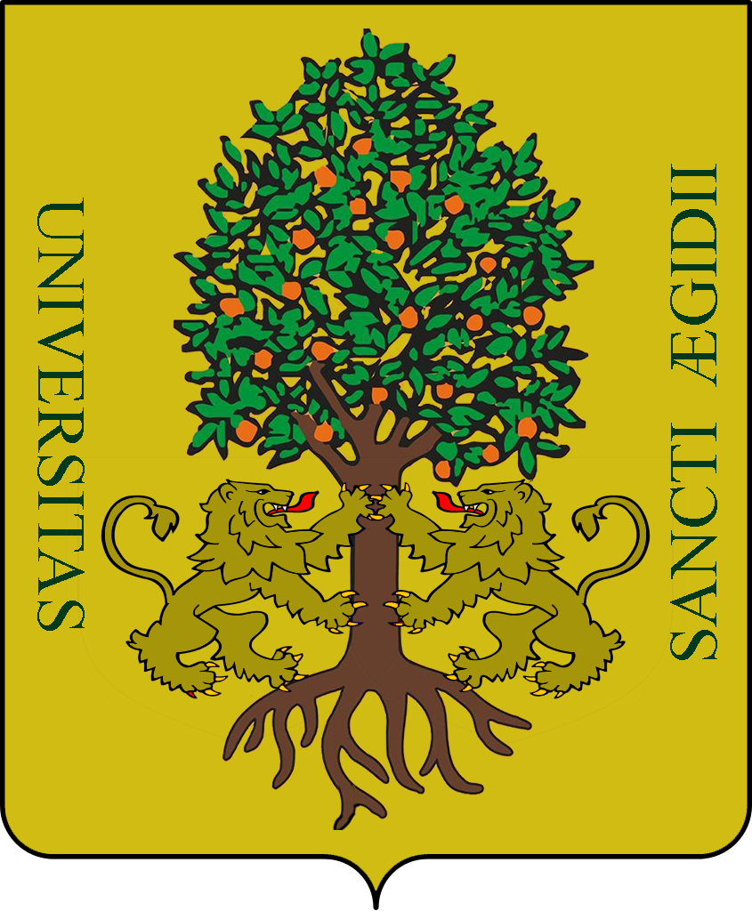 Riadattazione dello stemma dell'antica università di Sant'Egidio, realizzato seguendo le ricerche storiche usate anche dalle associazioni rievocative del territorio. La riproduzione è approssimata ed ha un puro fine informativo e didattico.